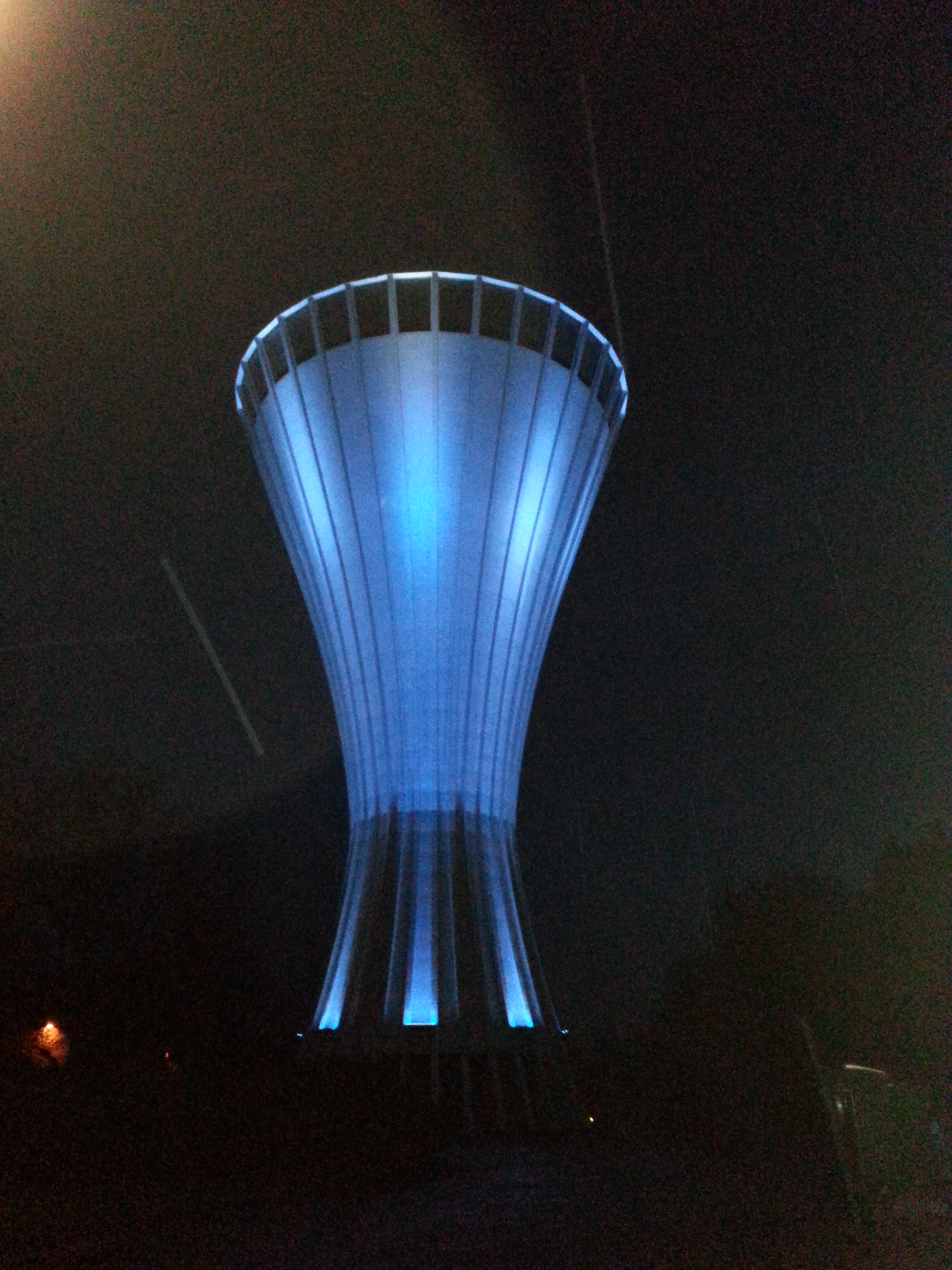 Vandtårn på Sjællandsvej om natten, set fra vest